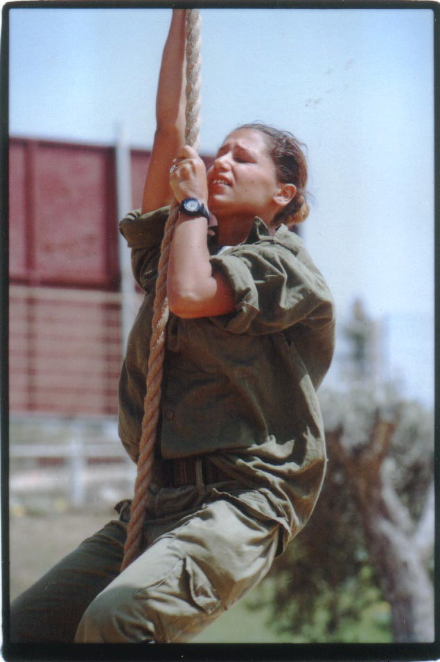 June 5, 2001. The IDF Physical Fitness Instructors Course is held at the Wingate base. Those who complete it continue on to various units in the army where they take part in the physical training of other soldiers. קורס מדריכות כושר קרבי מתנהל בבסיס ווינגייט. החיילות אשר מסיימות את הקורס בהצלחה ממשיכות הלאה ליחידות השונות בצבא, שם הן מאמנות חיילים אחרים ומקפידות על הכושר הקרבי שלהם.